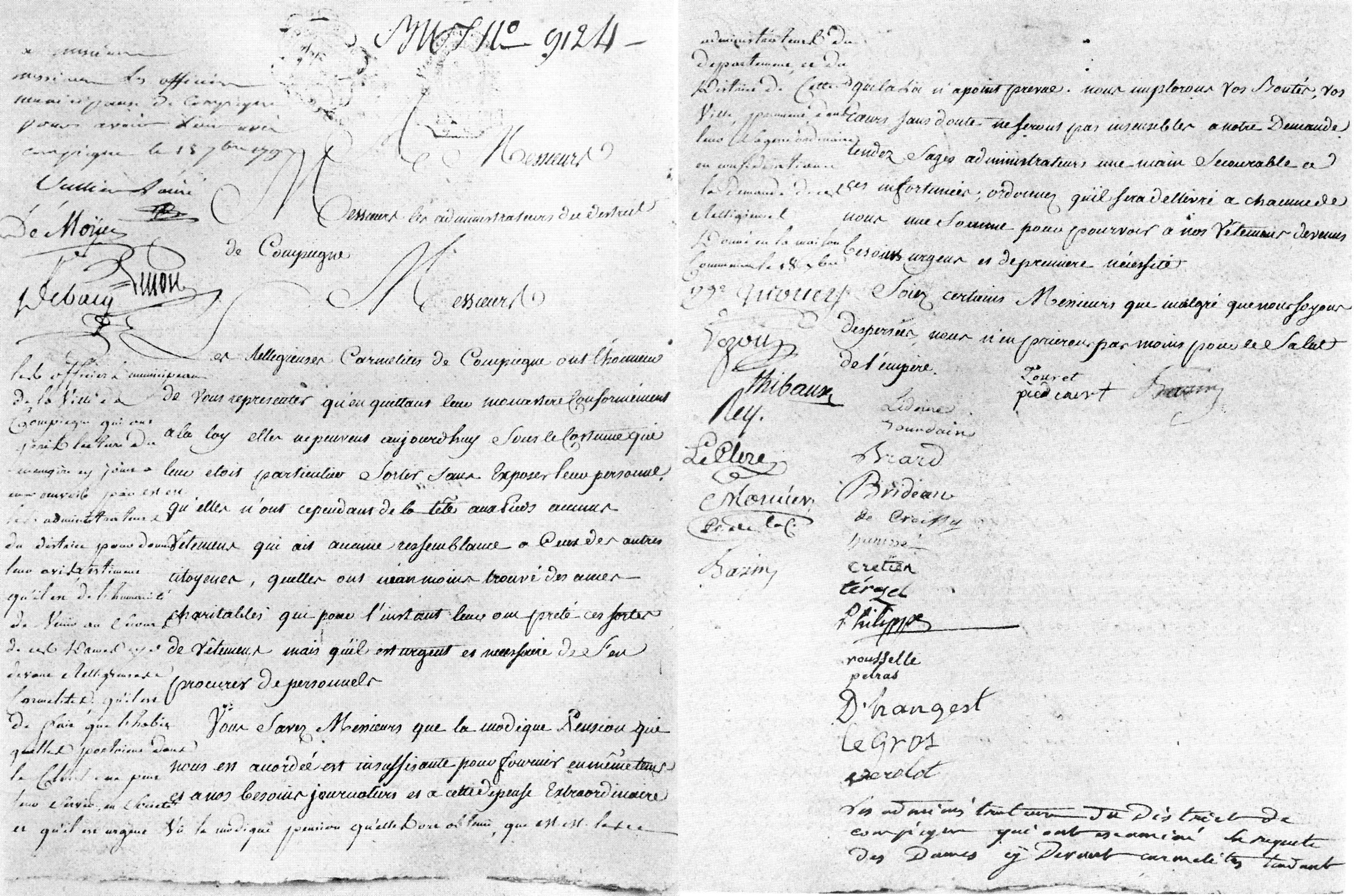 Carmélites de Compiègne. Fac-similé de la requête des carmélites avec leurs signatures. Extrait de Henri Chérot (s.j.), Figures de Martyrs [...] Deuxième édition revue [...] par Eugène Griselle, Paris, Beauchesne, 1907